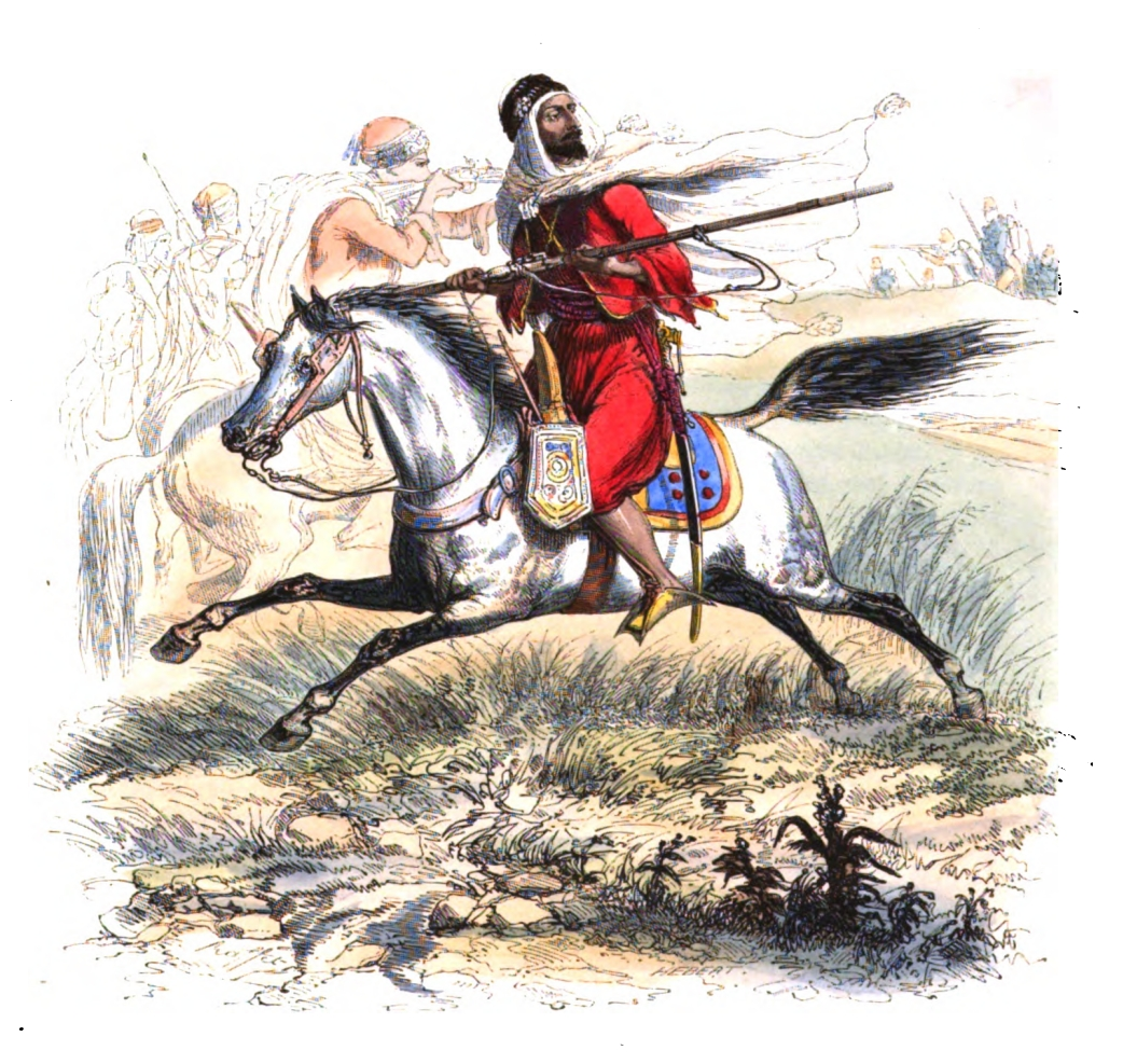 Régiments envoyés en Afrique de 1830 à 1843 - Cavaliers rouges d'Abd el Kader